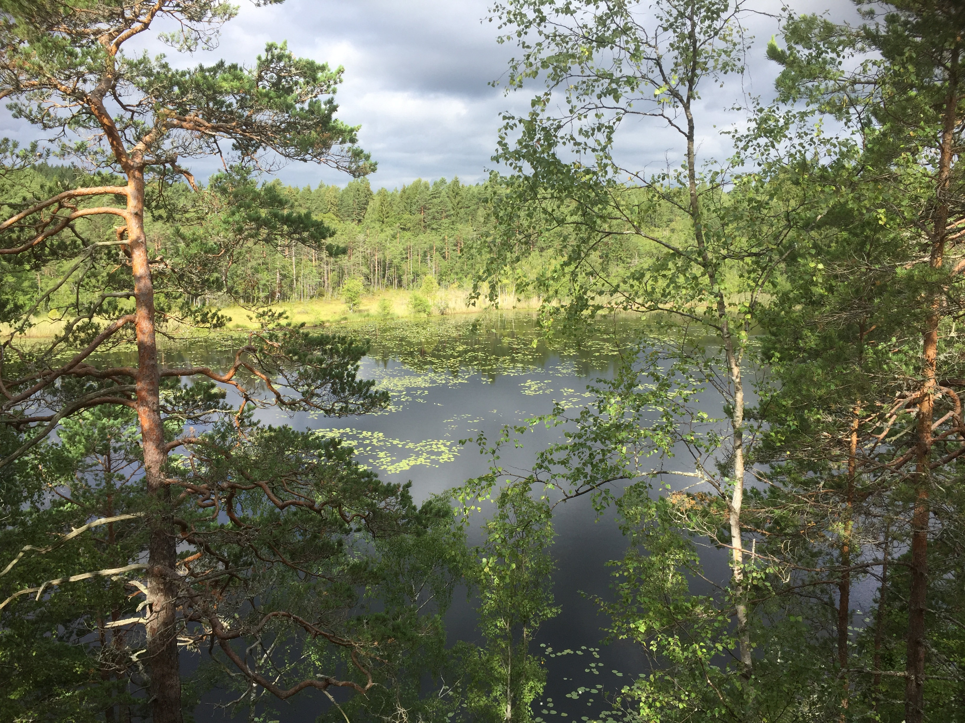 Lillgöl, Västra Eds socken, Sverige